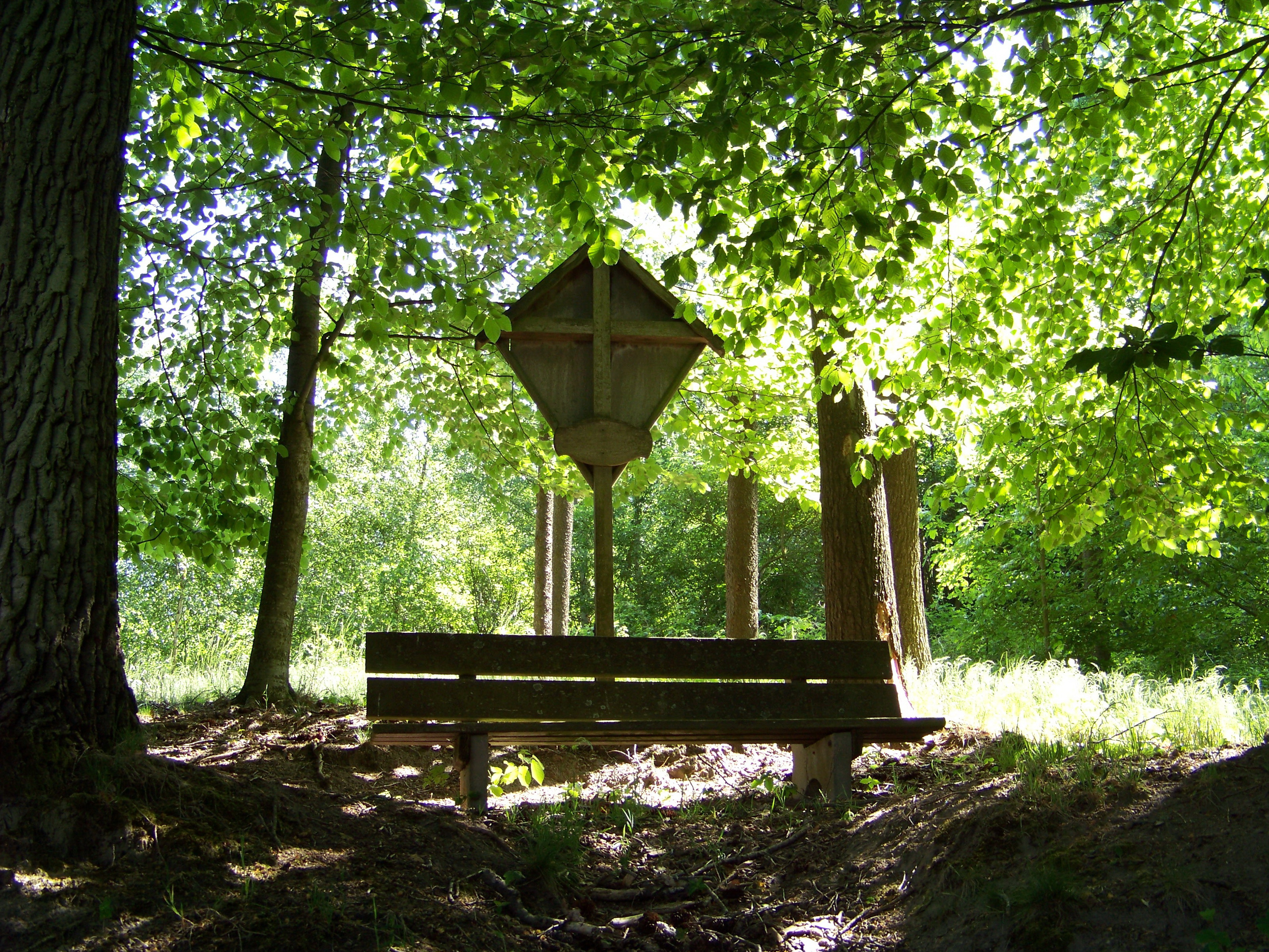 Laberweinting, Hofkirchen. Gedenkkreuz zu Ehren der verstorbenen und gefallenen Waldarbeiter aus Hofkirchen. Das Kreuz, das seit 1875 an diesem Platz steht, wurde von Konrad Stadler 1985 erneuert.